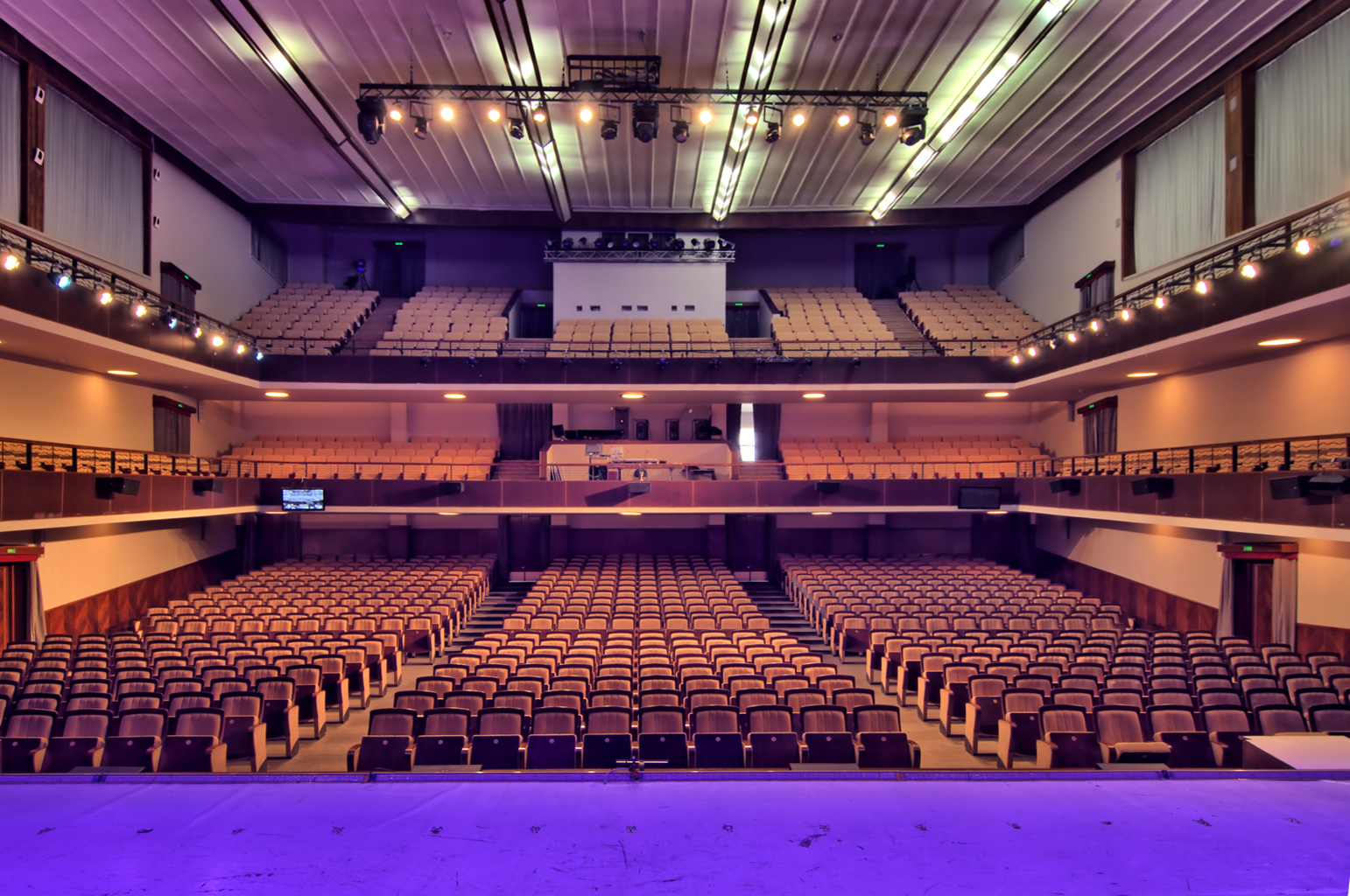 Ракурс со сцены